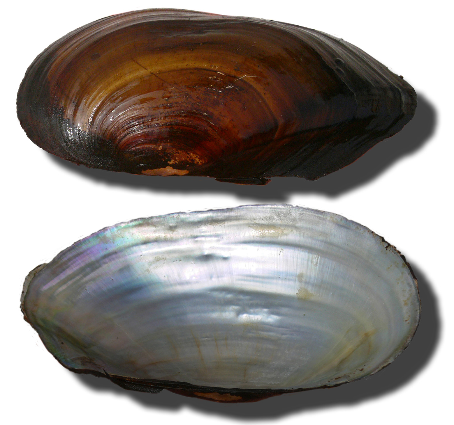 Description: Faces (externe et interne nacrée) de l'Anodonte du cygne, invertébré des eaux douces. Celui ci mesure plus de 17 cm. Photo prise dans le nord de la France par F Lamiot, et mise à disposition sous licence CC-BY-SA